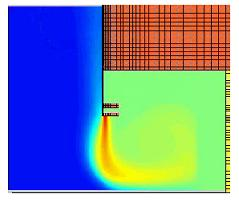 Ce schéma montre la déperdition de chaleur à l’entrée d’un magasin équipé d’un rideau d’air.